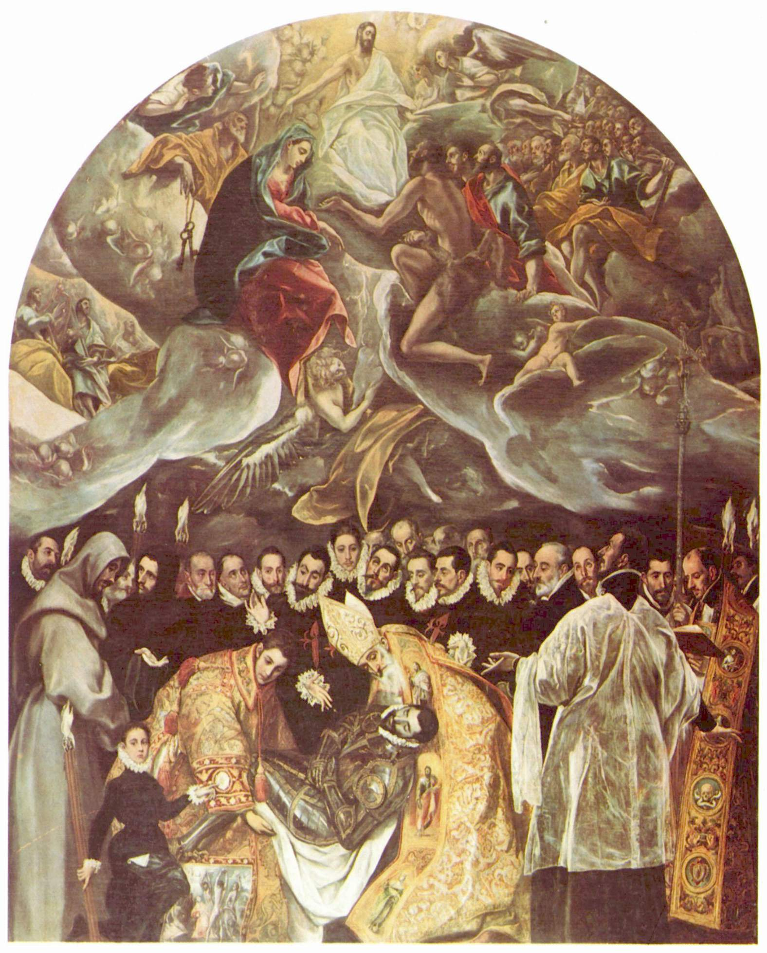 El entierro del señor de Orgaz, más conocido como El entierro del conde de Orgaz, es un óleo sobre lienzo pintado en estilo manierista por El Greco entre los años 1586 y 1588. Fue realizado para la iglesia de Santo Tomé de Toledo, (España), donde aun permanece, y es considerada una de las las mejores obras de su autor. El cuadro representa el milagro en el que, según la tradición, San Esteban y San Agustín de Hipona bajaron del Cielo para enterrar personalmente a Gonzalo Ruiz de Toledo, señor de la villa de Orgaz y fallecido en 1323, en la iglesia de Santo Tomé, como premio por su vida ejemplar de devoción, humildad y obras de caridad. El Greco aceptó el encargo de realizar la obra en 1586, algo más de dos siglos y medio después de los hechos que en ella representó.